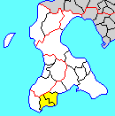 北海道福島郡の位置。